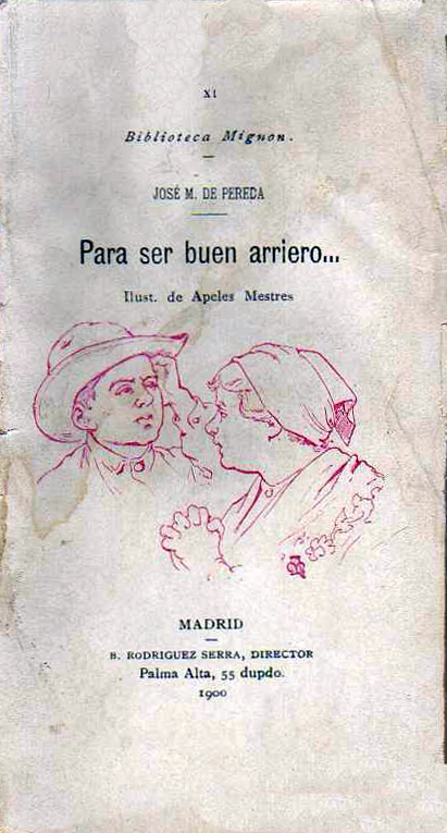 Portada de Para ser buen arriero.